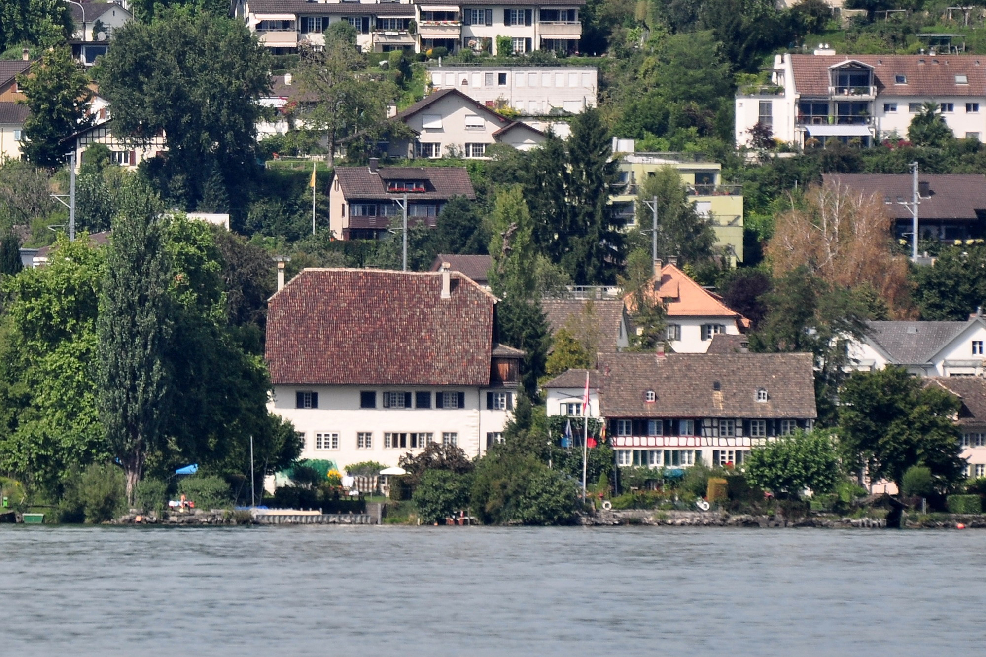 Ritterhäuser in Uerikon (Switzerland) as seen from Zürichsee-Schifffahrtsgesellschaft (ZSG) motorship Helvetia